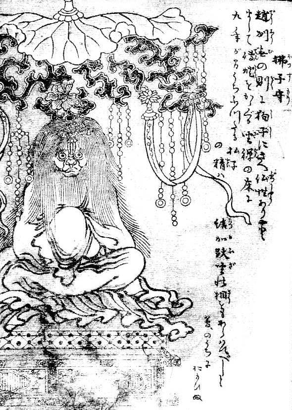 Hossumori (払子守) from the Gazu Hyakki Tsurezure Bukuro (百器徒然袋)